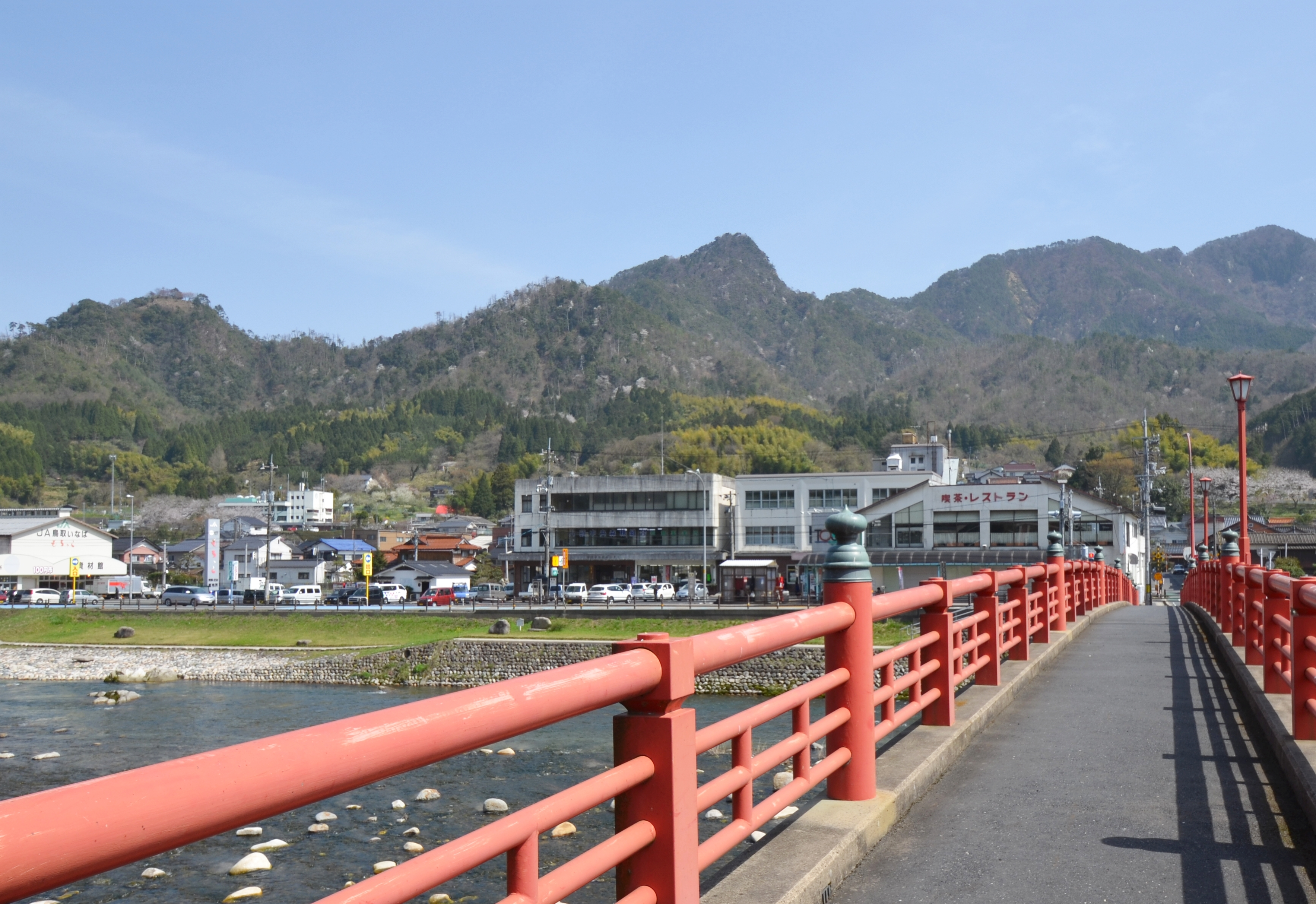 雛橋から望む三角山